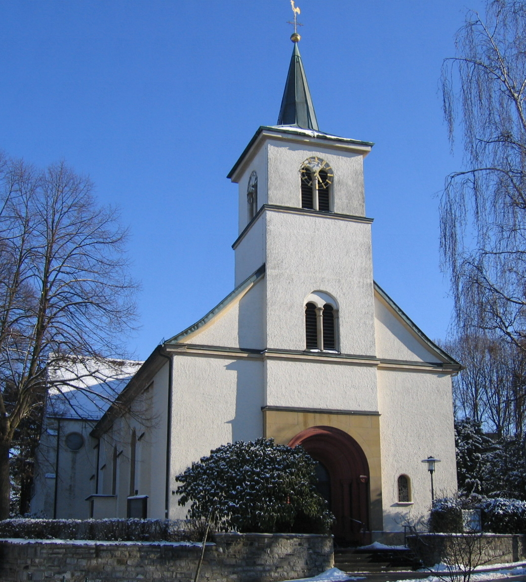 Description: Katholische Kirche "St. Gertrudis" in Iserlohn-Sümmern, Gertrudisstraße 5 Source: selbst fotografiert Date: 29. Jan. 2006 Author: Asio otus